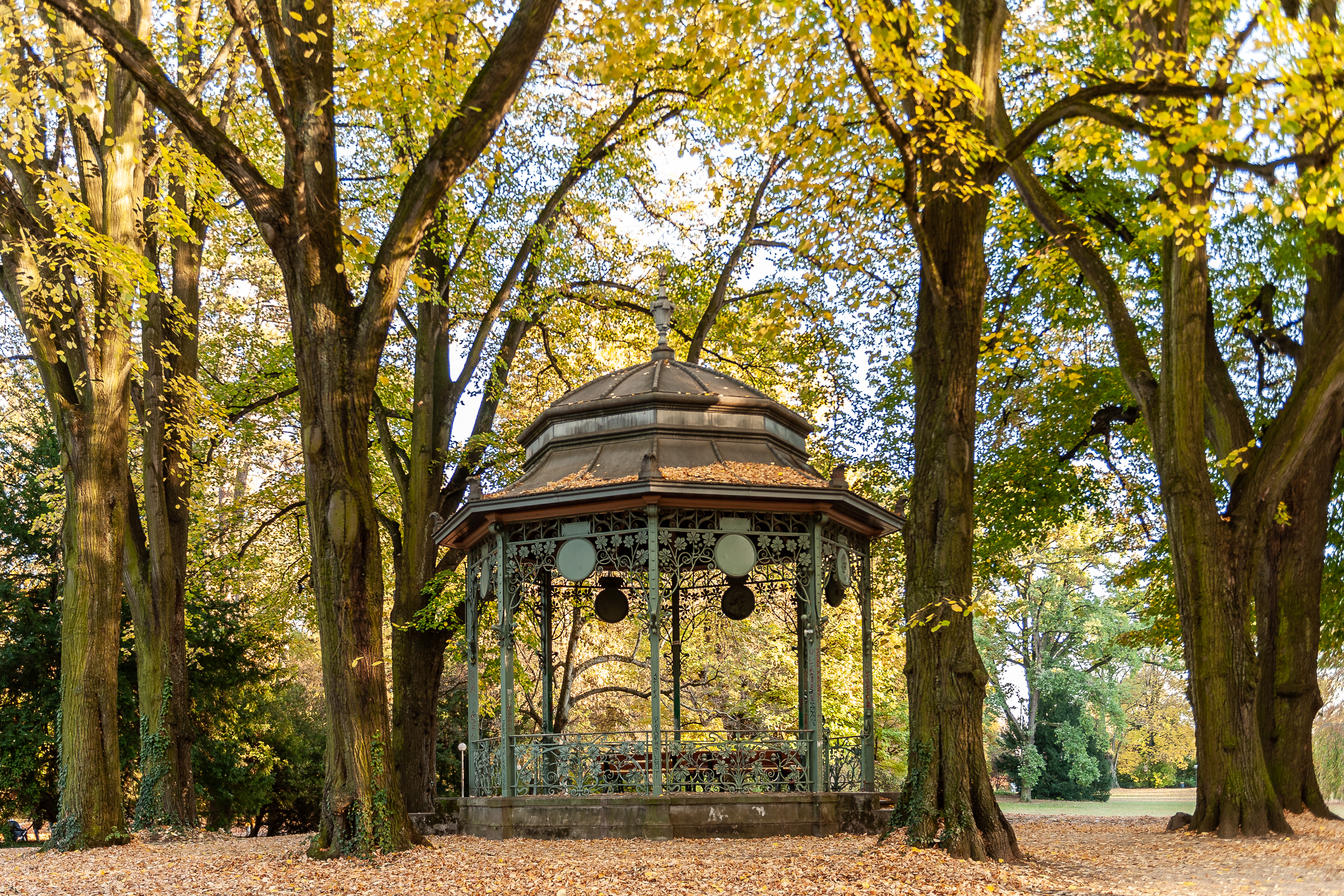 Kurpark, Stuttgart-Bad Cannstatt